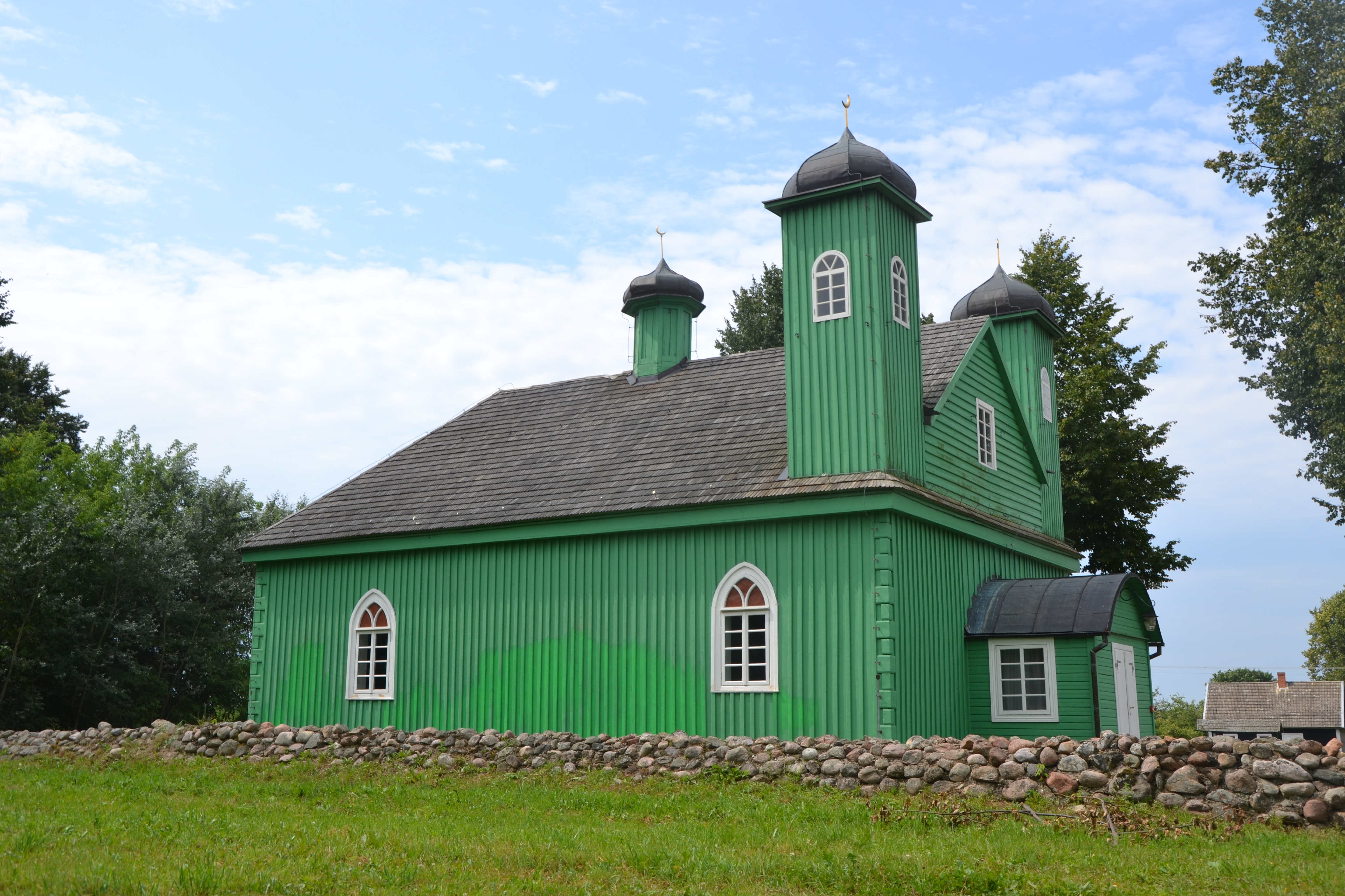 Kruszyniany, meczet muzułmański, XVIII